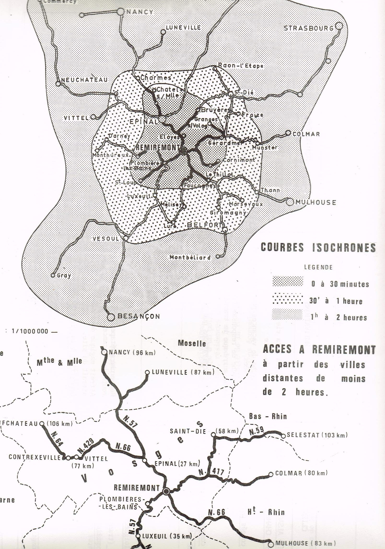 Département des Vosges, « Plan d’eau de Noirgueux », Site de plan d'eau de Remiremont, Reconnaissances 1969, Rapport de synthèse. A la suite du rapport technique sommaire du 4 janvier 1963 d'André Gravier, ingénieur conseil des études ont été réalisées par l’Agence financière de bassin Rhin-Meuse en janvier 1970, lesquelles seront complétées par celles de l’AGORA - LORRAINE et la SEBA, en janvier 1971 pour le compte du Conseil général des Vosges, sous la direction de l’Office départemental du tourisme des Vosges. Le lac et les villes périphériques, Page 20